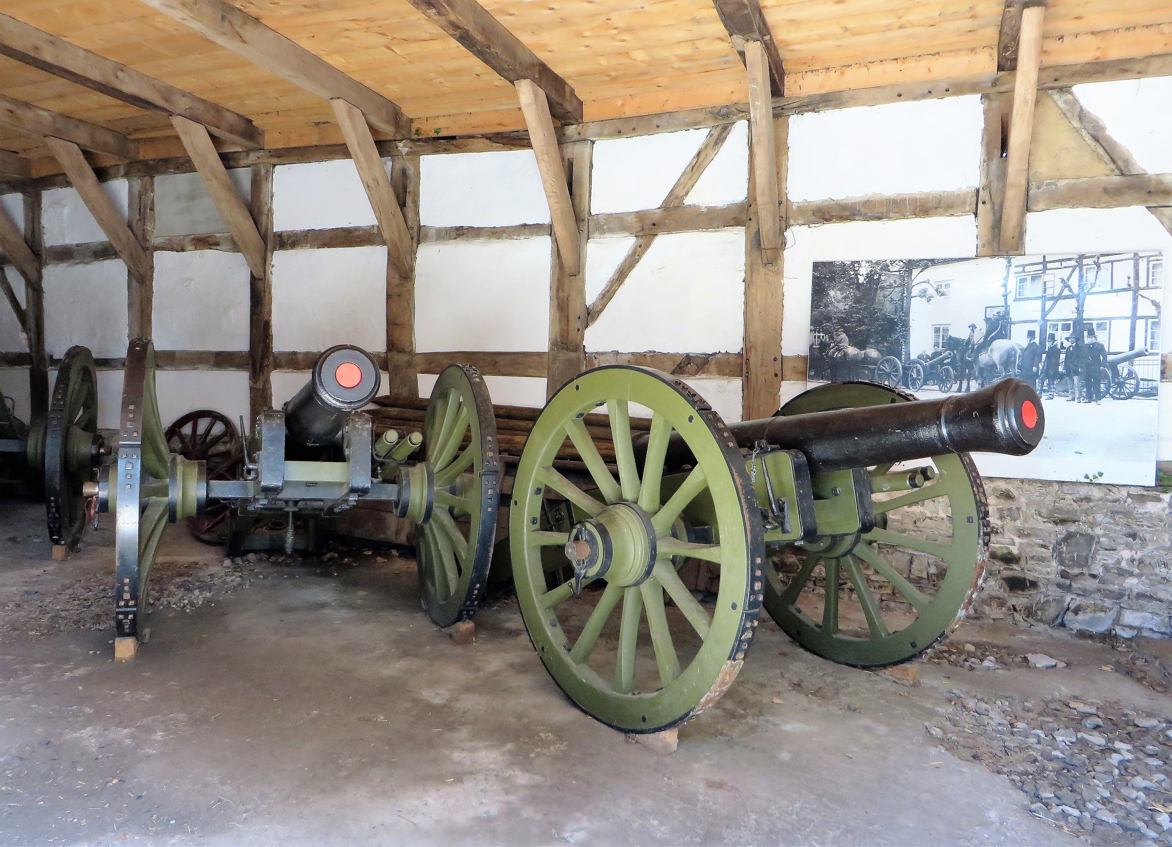 Schlosskanonen in der Wagenremise von 1745 am Aufgang zum Schloss Hohenlimburg. Die vier Geschütze wurden zwischen 1996 und 2000 restauriert und neu lafettiert. Sie standen früher auf dem Kanonenplatz gegenüber dem Torhaus (heute Aussichtsterrasse). Neben ihrer Funktion als „Wahrzeichen“ stellen sie weltweit zurzeit die wohl genauesten Rekonstruktionen von Feldgeschützen nach dem System Gribeauval aus der Zeit um 1800 dar. Nach Hohenlimburg kamen sie Anfang des 19. Jahrhunderts und dienten bei Geburtstagsfeiern und Empfängen des Fürstenhauses als Salutgeschütze. Anlässlich des Iserlohner Aufstands von 1849 wurden die Geschütze von Aufständischen geraubt und kamen erst 1851 zurück. – Ursprünglich handelt es sich bei den vier Kanonen um Schiffsartillerie, zwei Geschütze wurden 1793/1795 auf Großkampfschiffen der französischen Marine eingesetzt. Eine dritte wurde in einer schwedischen Gießerei gefertigt (erste Hälfte 18. Jh.). Eine Rarität ist das vierte Geschütz, es ist mehr als 300 Jahre alt und wurde ebenfalls in Schweden für den Gebrauch auf Schiffen unterschiedlichster Nationen gefertigt.